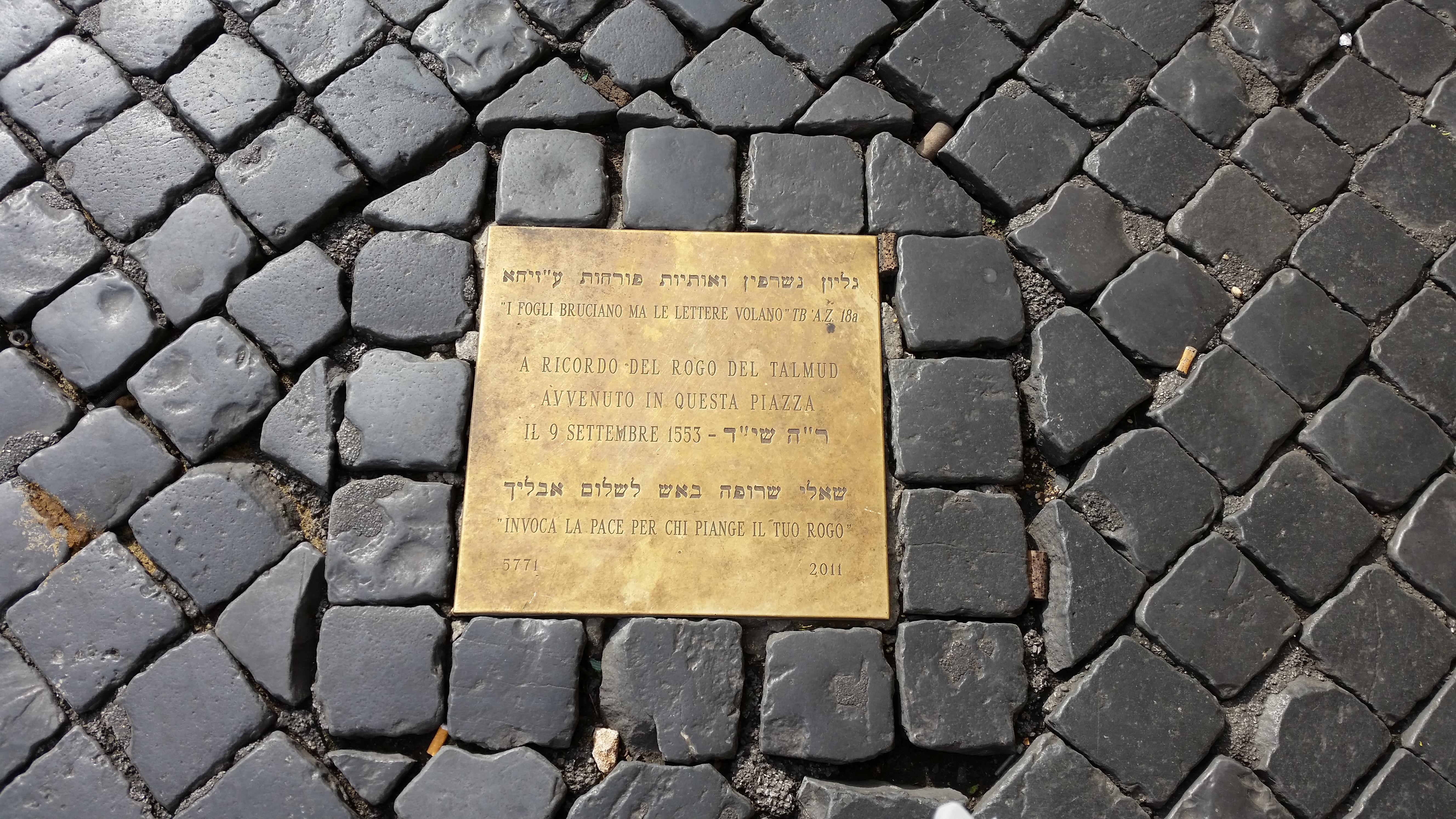 Campo de'Fiori 1553 Talmud burning memorial board